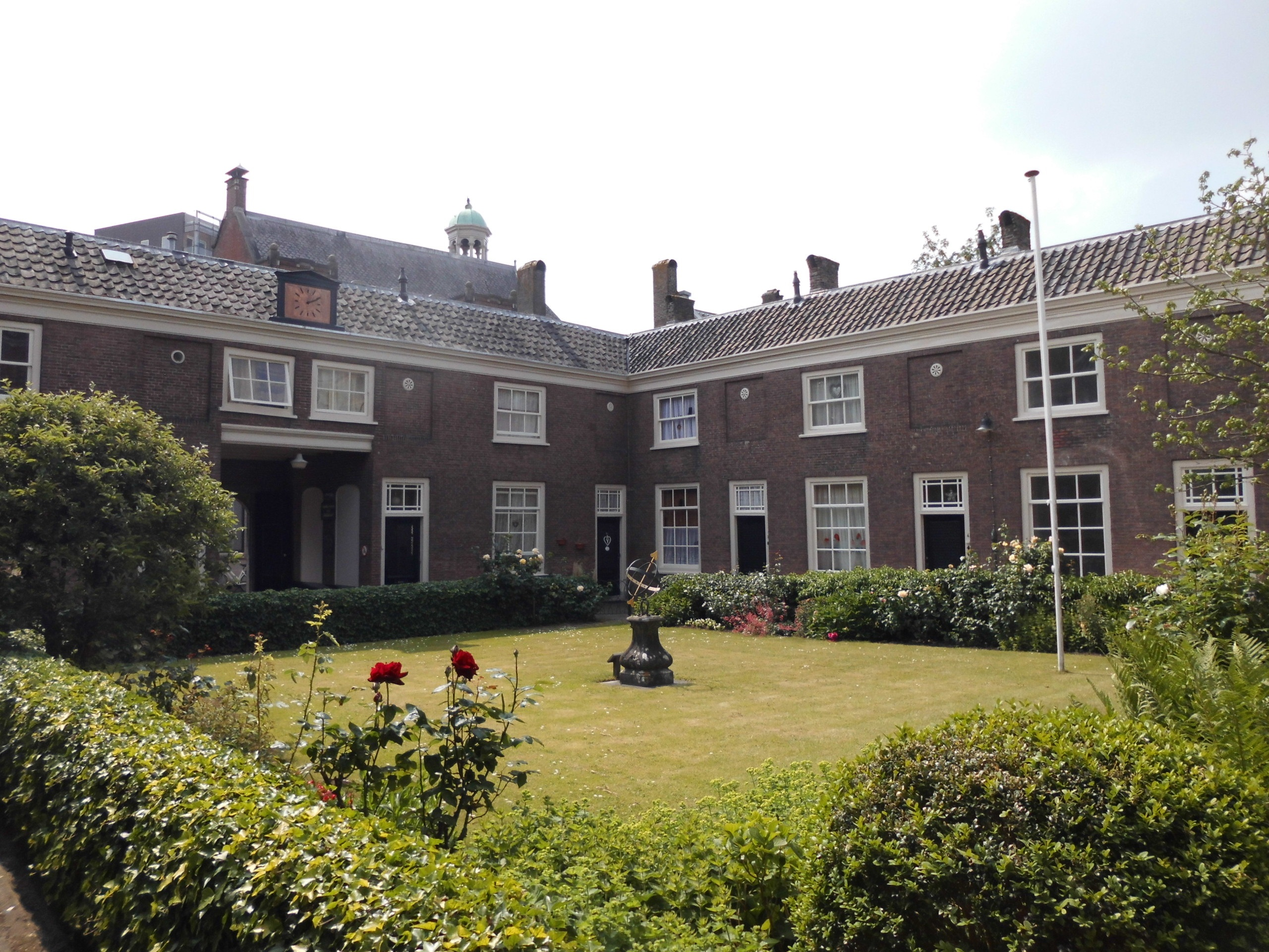 Regenten- of Lenghenhof - Lenghenhof - Dordrecht - Zuid-Holland - Nederland